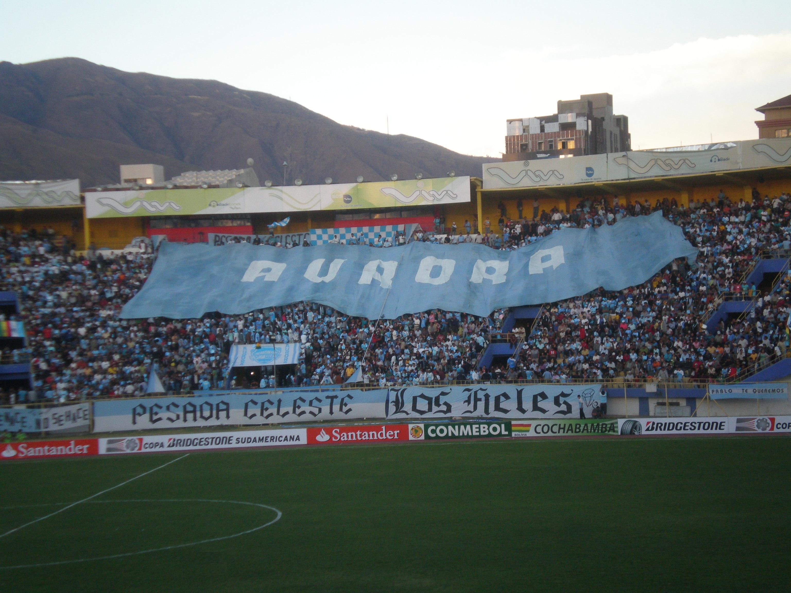 Hinchada del Club Aurora que se ubica en la recta de General del Estadio Sudamericano Félix Capriles de Cochabamba-Bolivia.